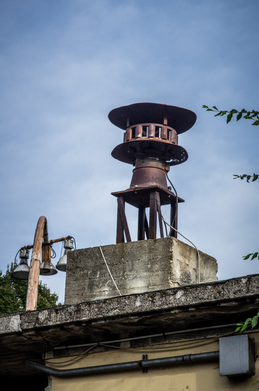 Comparto Unione area ex-Falck This is a photo of a monument which is part of cultural heritage of Italy.